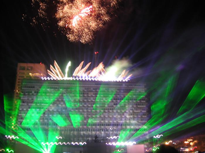 חגיגות ערב יום העצמאות בתל אביב, כיכר רבין. מופע מיוחד על קיר בנין עיריית תל-אביב ובו תמונות מההסטוריה של המדינה. זיקוקים מרהיבים. הפקה מדהימה ביופיה!